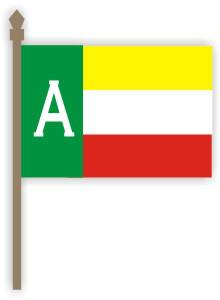 bandera oficial del distrito de Antauta, provincia de Melgar, Region Puno, editada por el Prof. Percy Quispe Anahua